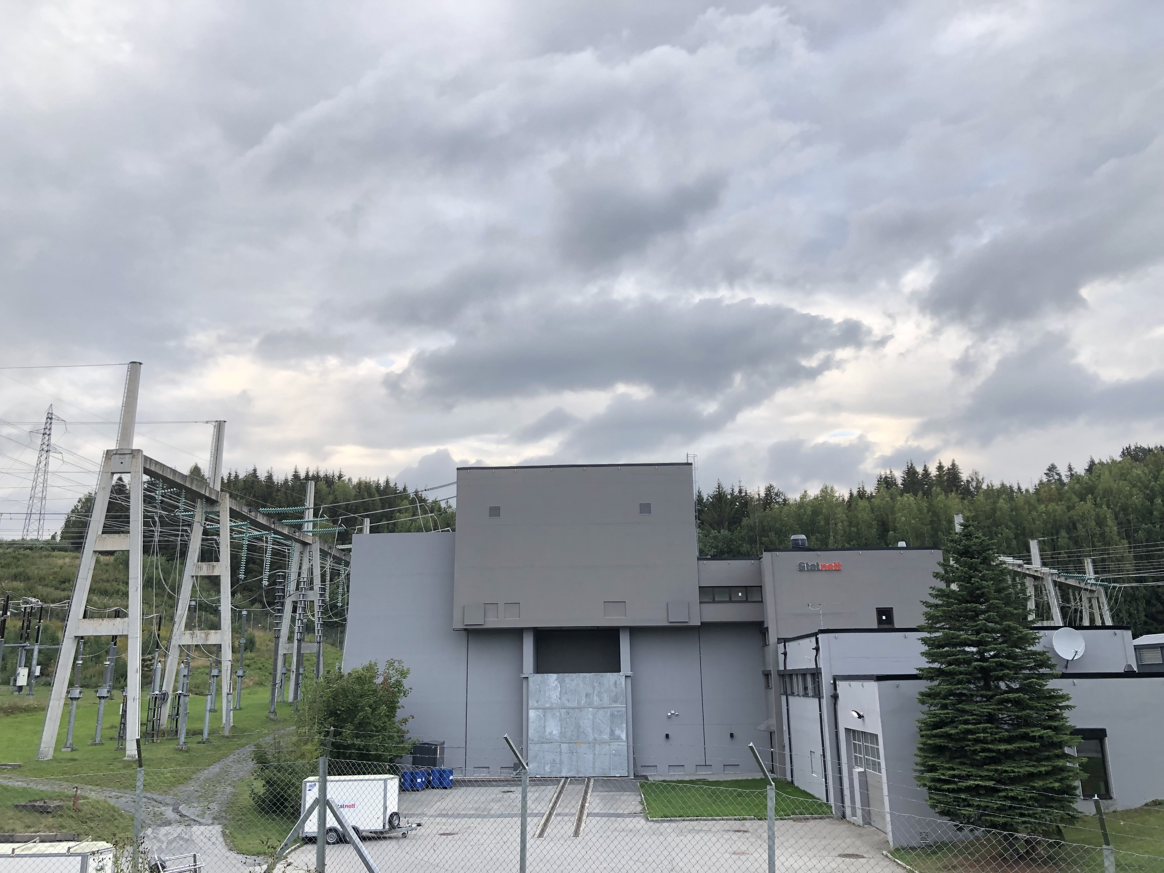 Ringerike transformatorstasjon, Sørumsmarka, Ringerike.